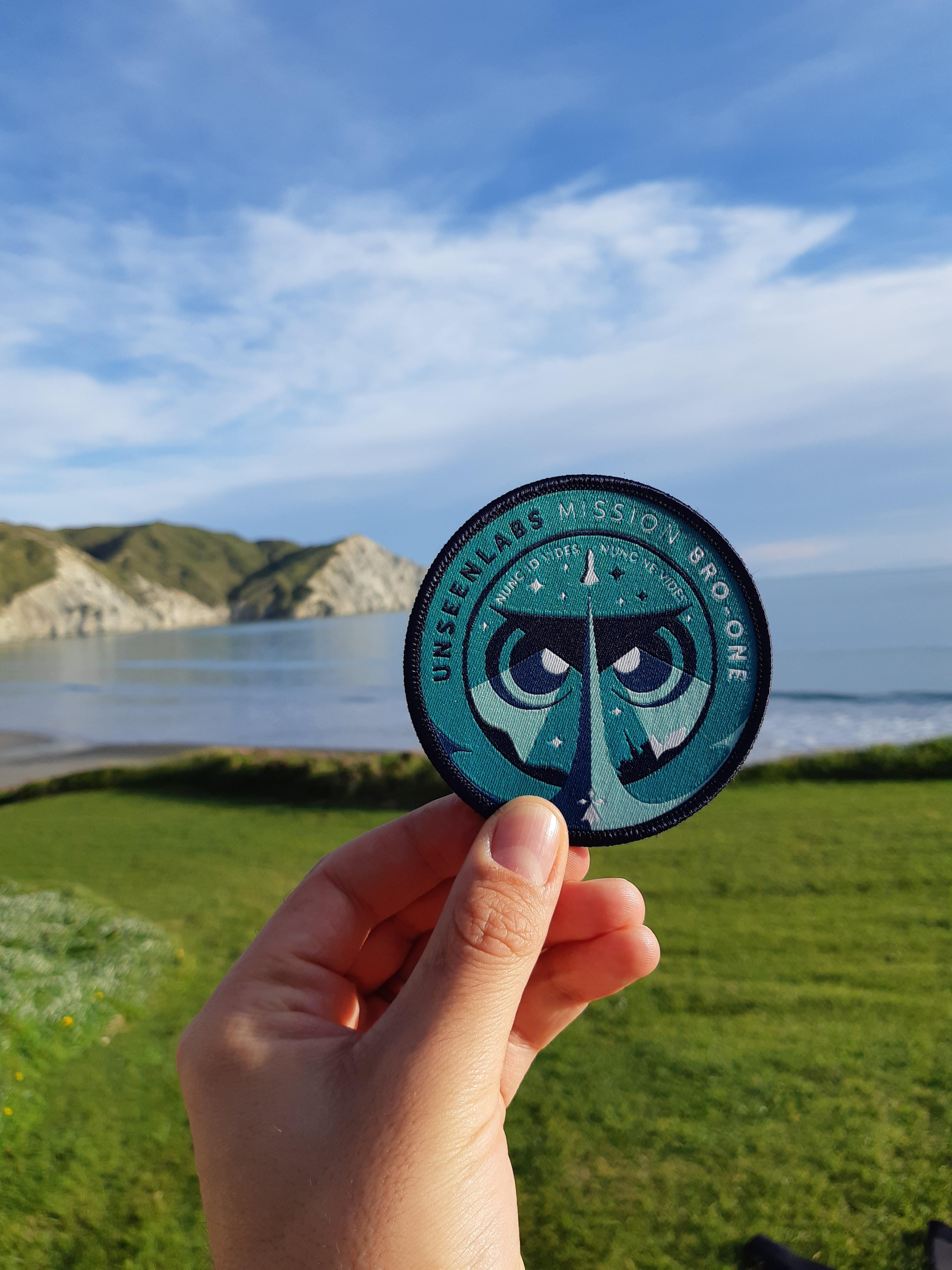 Patch bro-1 photographié par l'équipe UnseenLabs, sur la péninsule de Mahia, en Nouvelle Zélande.